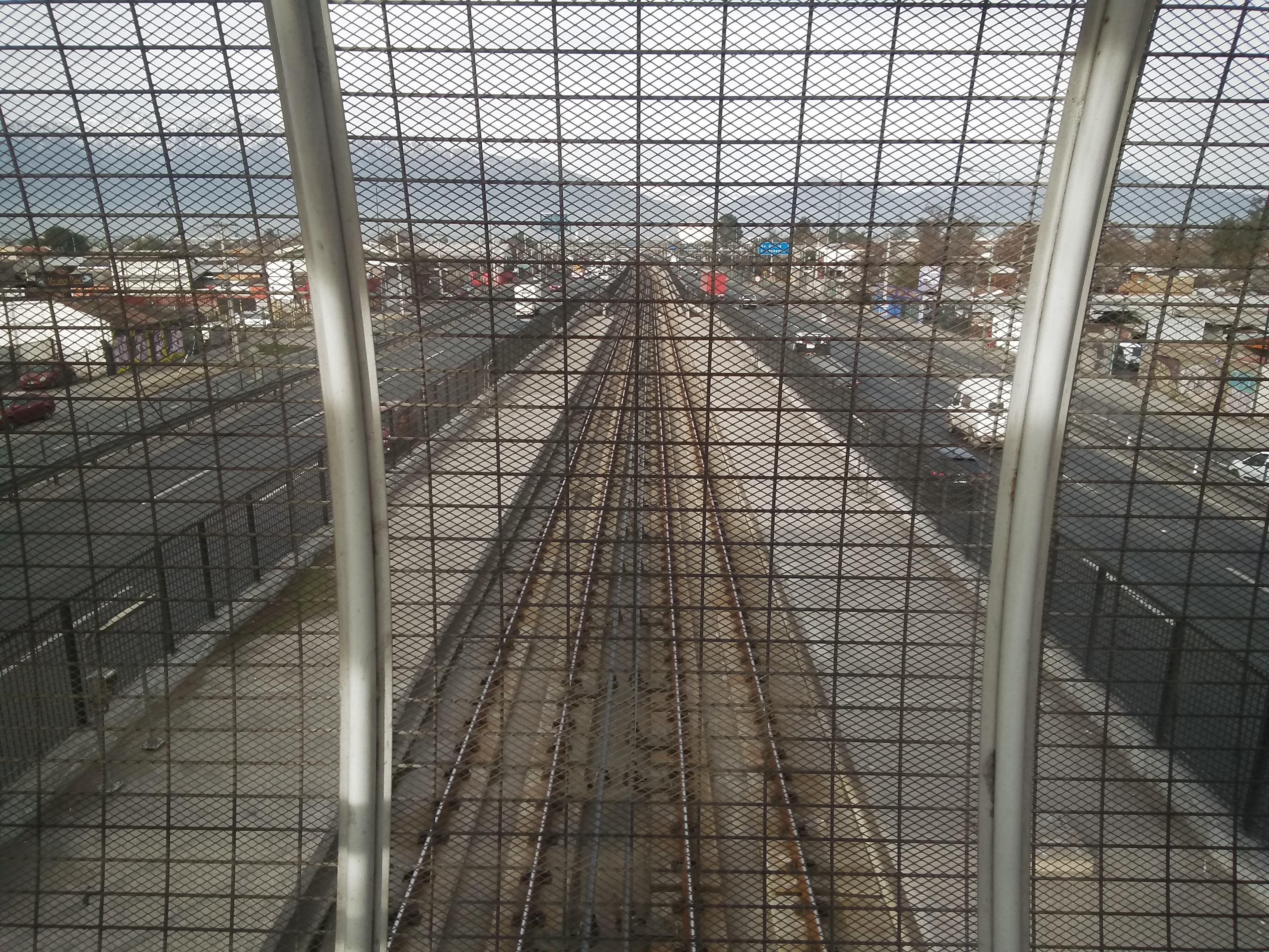 Vista hacia el oriente de los andenes de la estación fantasma Echeverría de la Línea 4A del Metro de Santiago. La estación estaba proyectada, sin embargo no está construida en su totalidad ni tampoco se encuentra operativa hasta el momento.